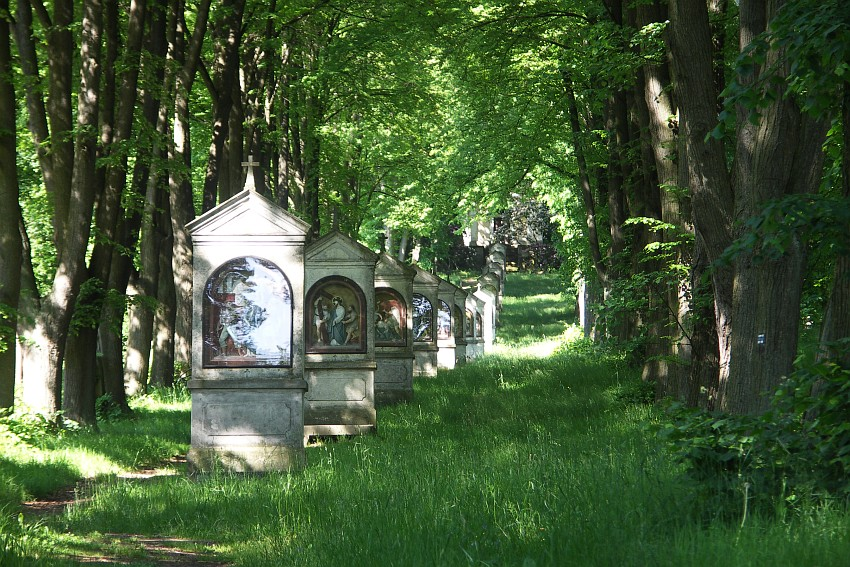 Křížový vrch (Cvikov), Czech Republic